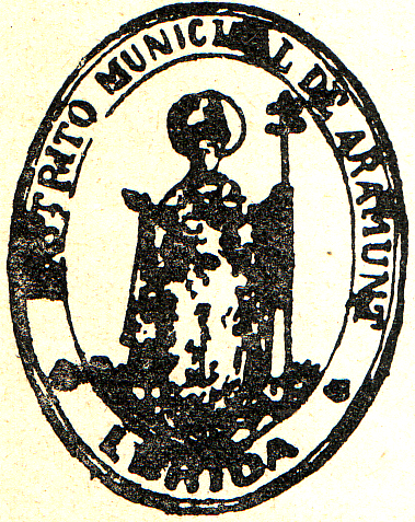 Segell municipal antic d'Aramunt (Conca de Dalt, Pallars Jussà)